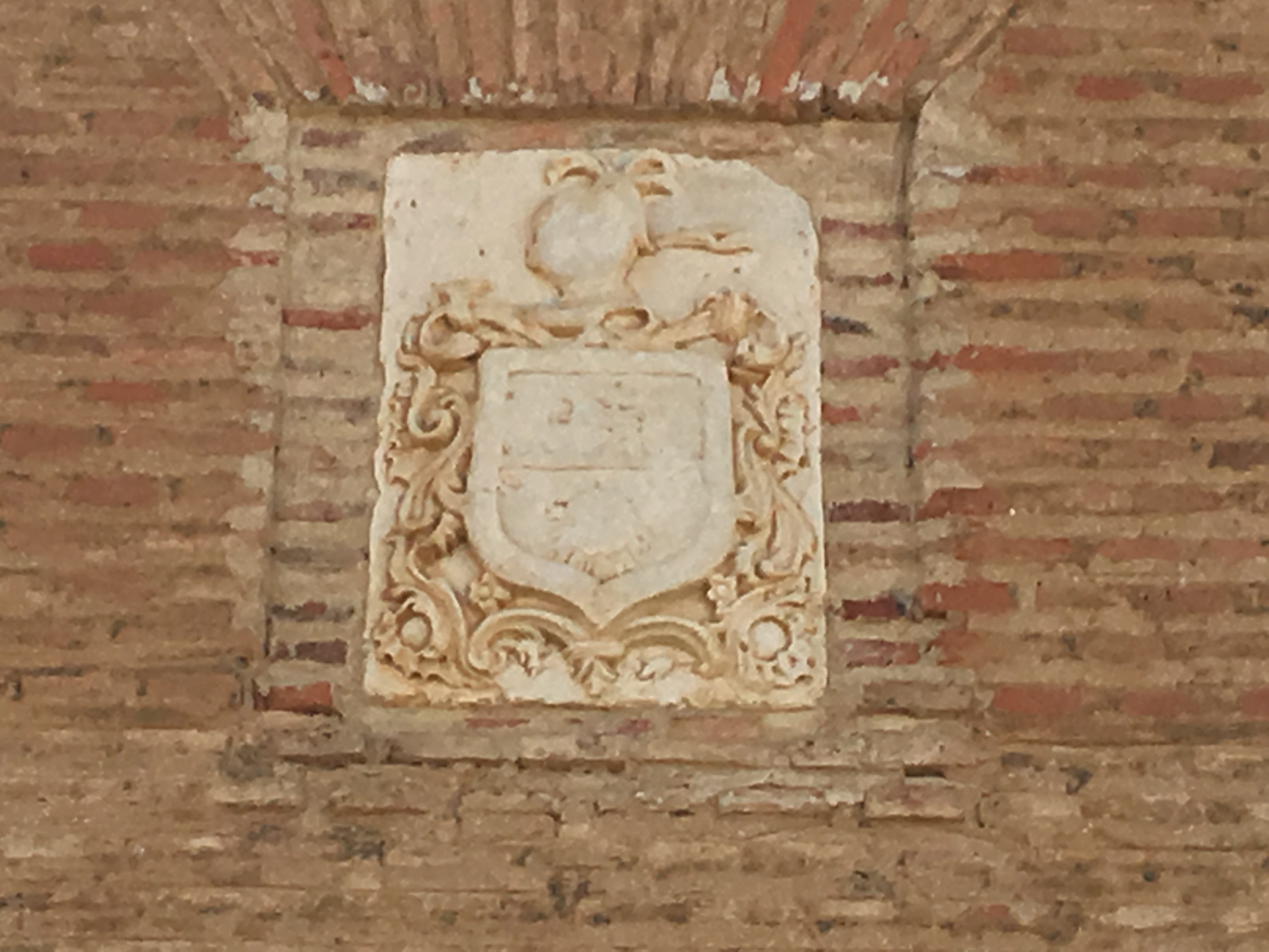 Villaesper Milenario